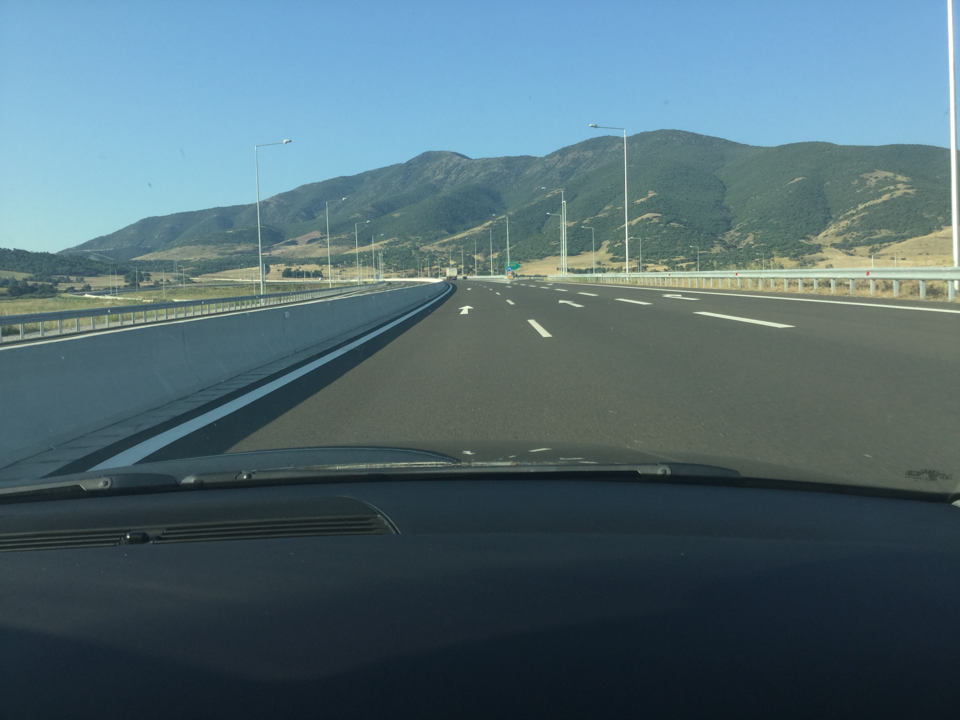 Η Οδός Κεντρικής Ελλάδος στην Άναβρα